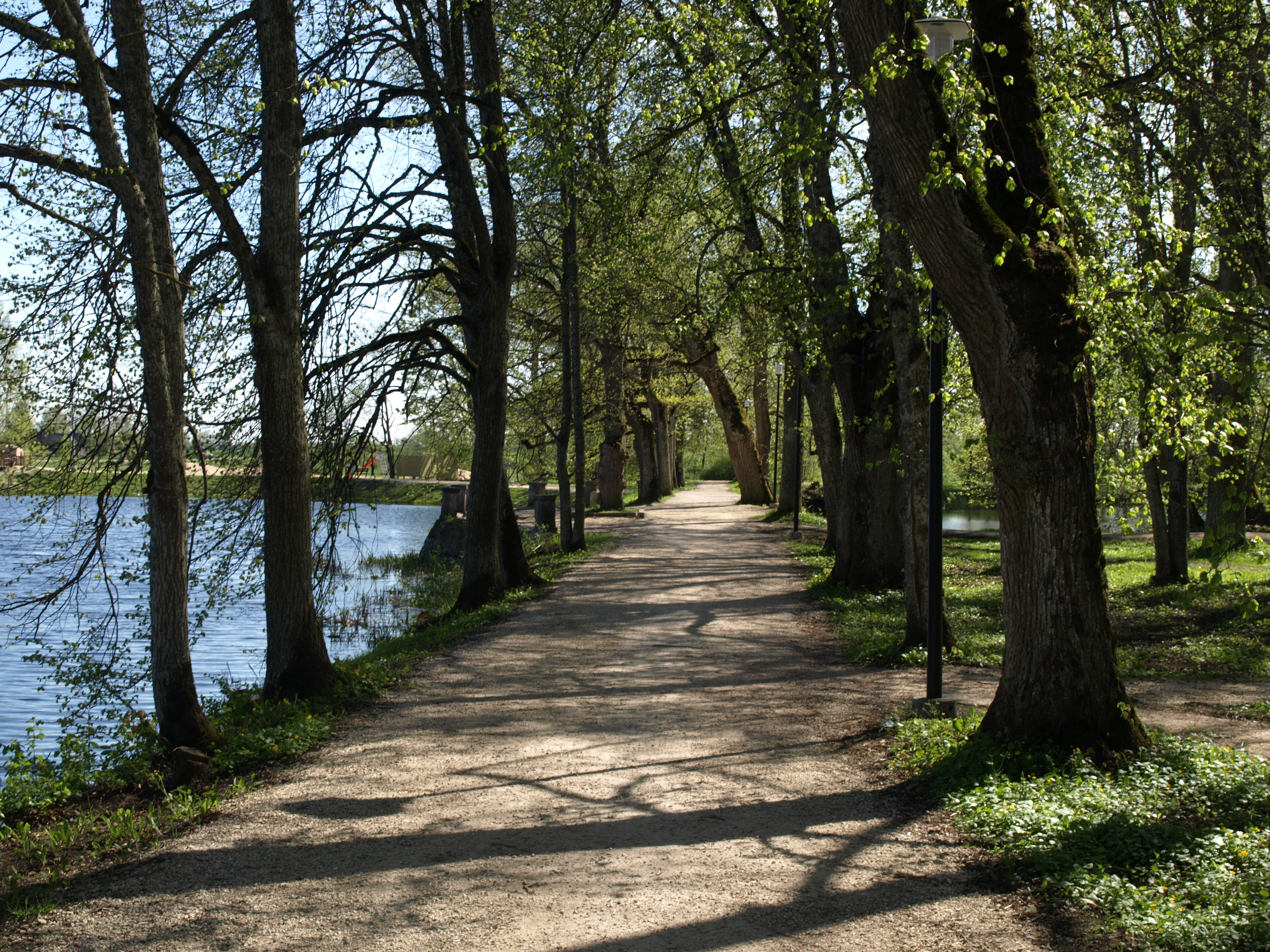 Puurmani mõisa park